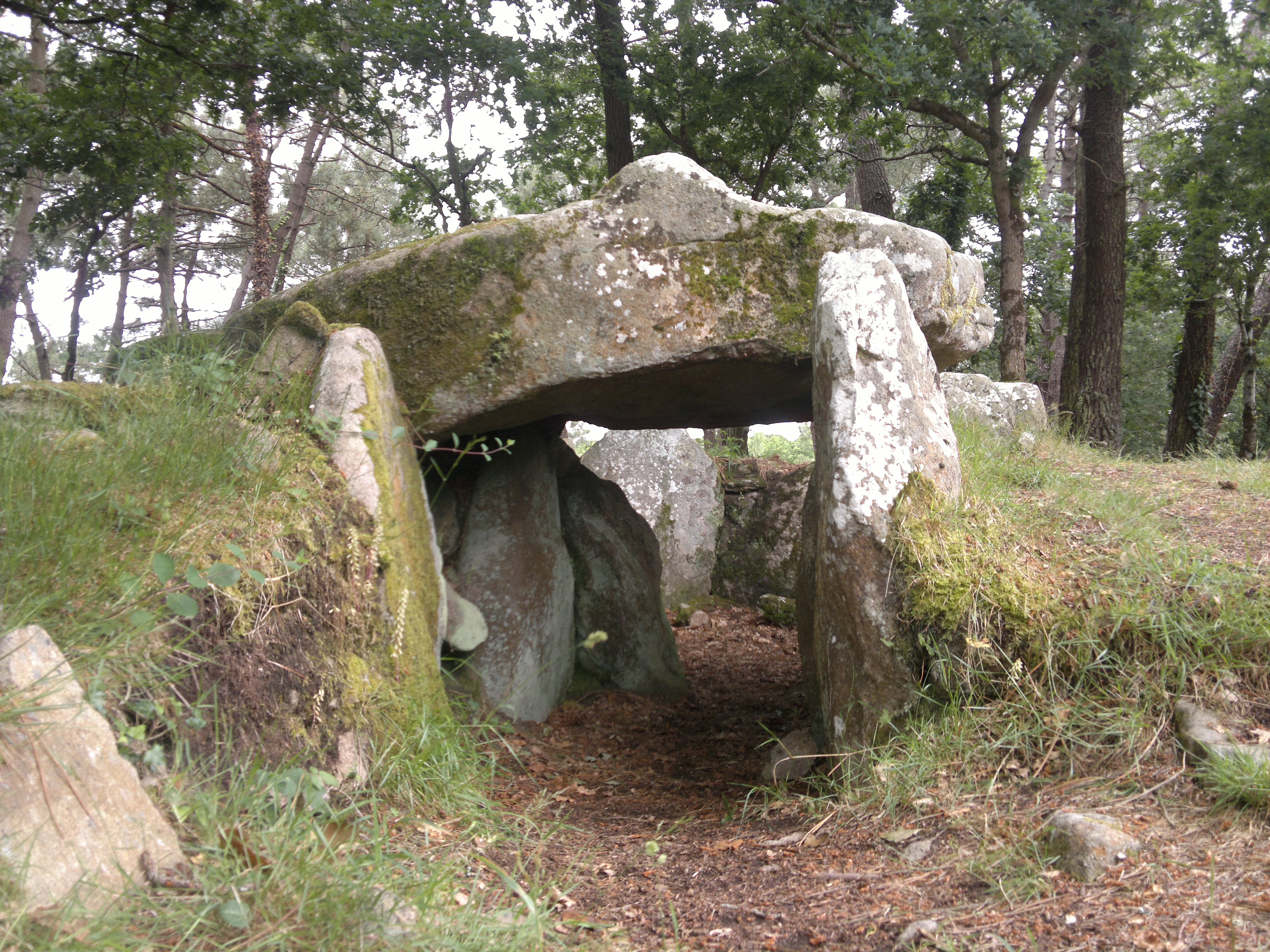 Dolmen de Kermarker, Fr-56-La Trinité-sur-Mer.